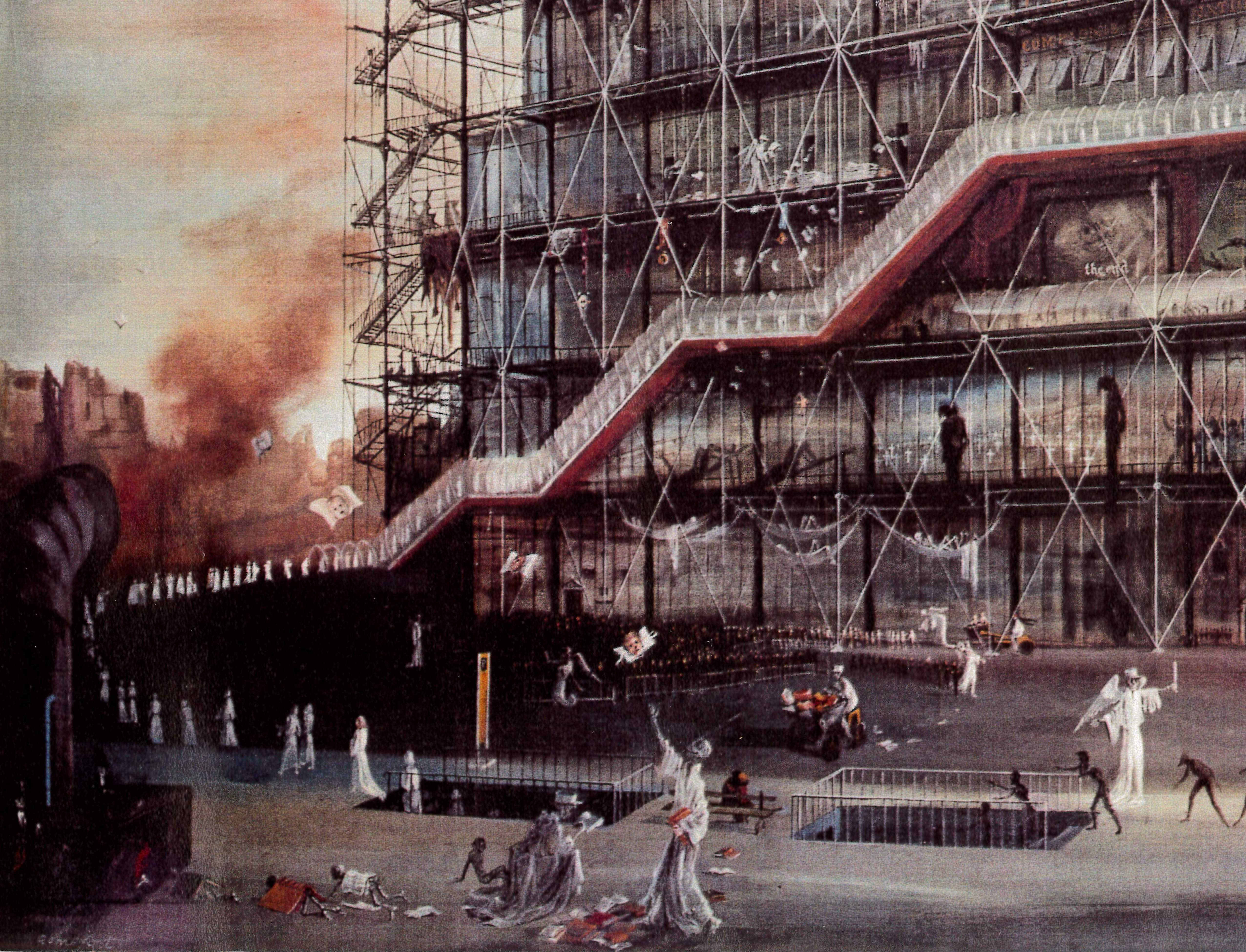 Claude de Romefort, Jugement dernier,1976, acrylique sur toile (3.15x2.30), détail (1.10 x1.90)